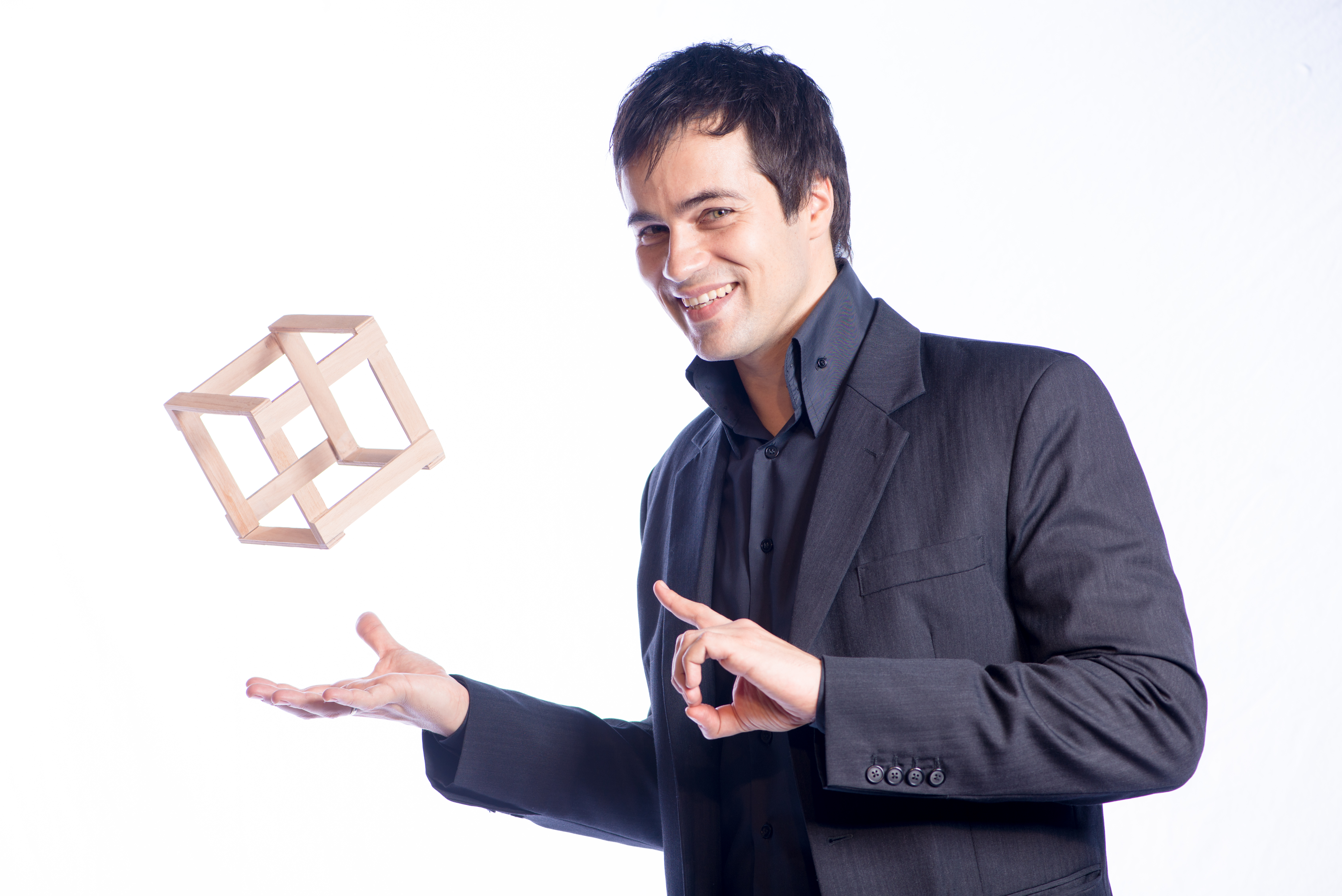 Lucca Lucian showing an impossible cube